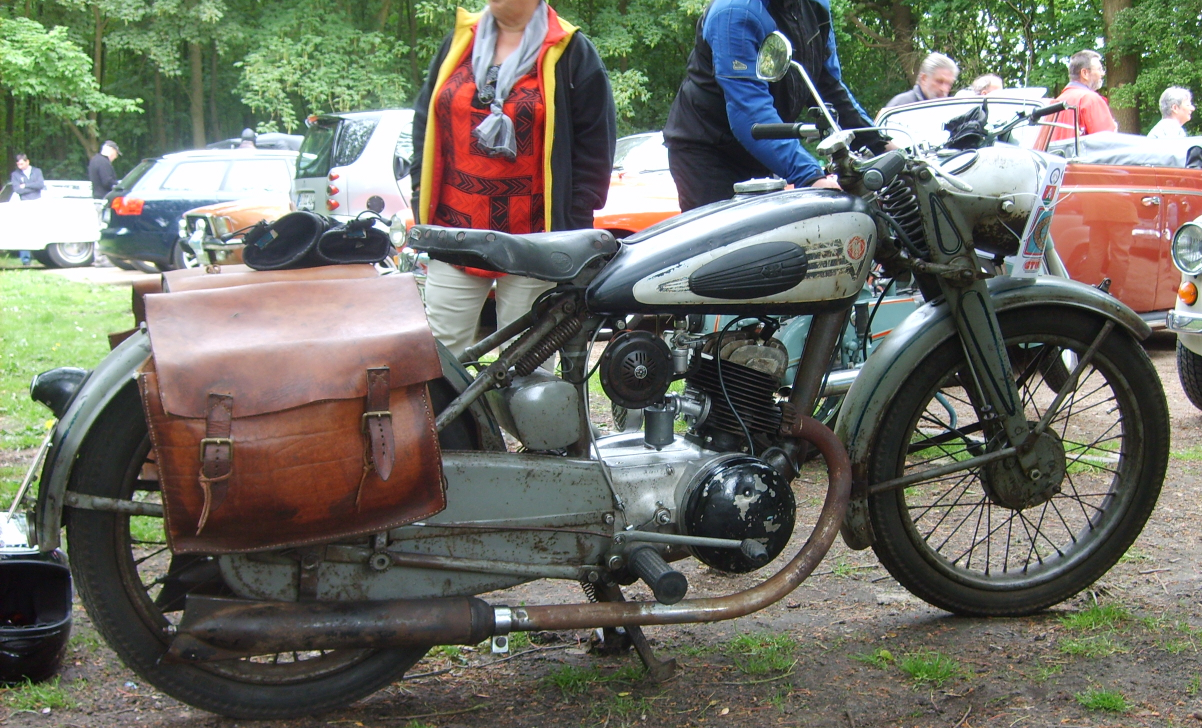 Viktoria KR 25 S, 1 Zylinder, 250 ccm, 9 PS, Baujahr 1938 beim Oldtimertreffen in Uetersen